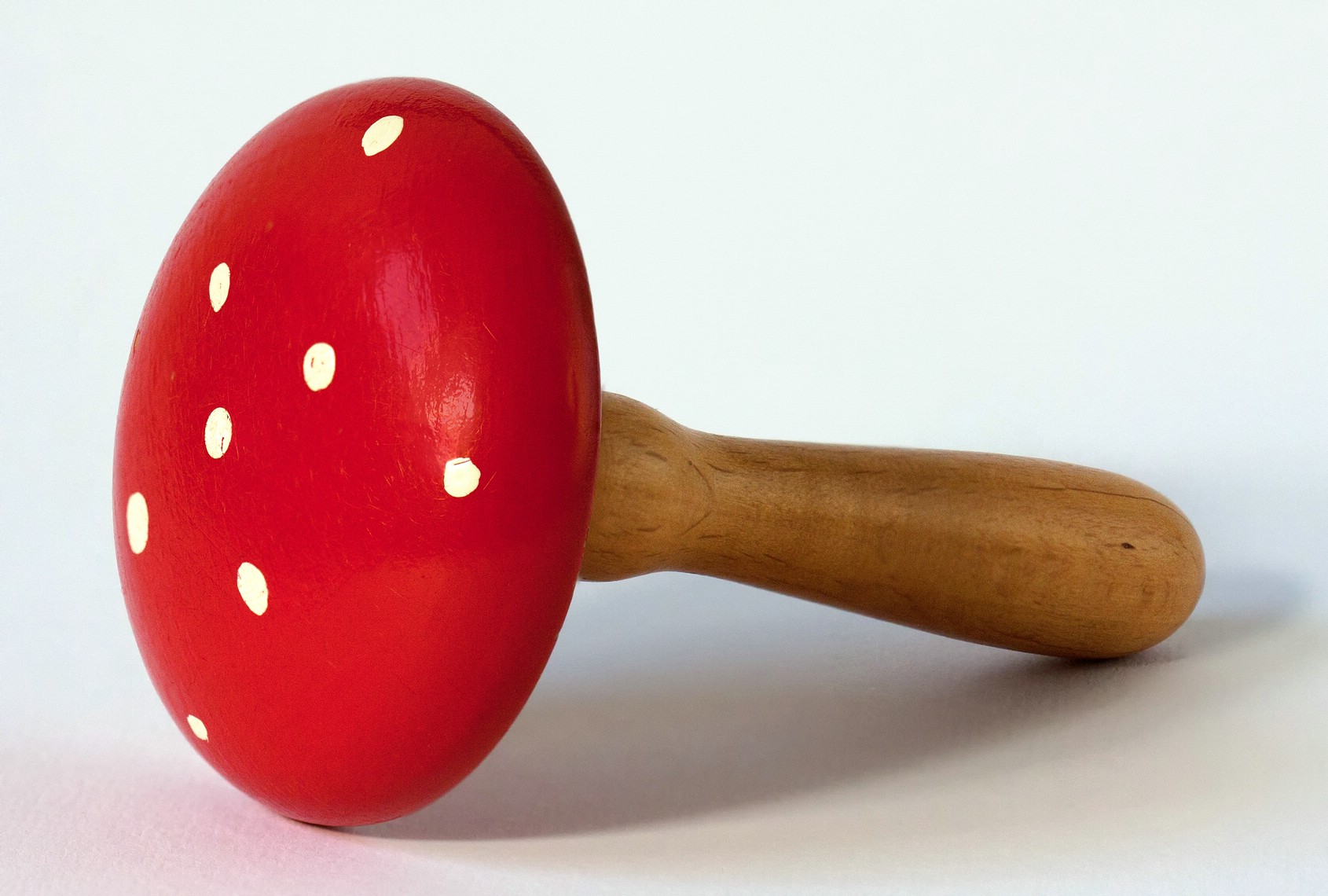 Ein Stopfpilz erleichtert das Stopfen von Textilien. Dieses Exemplar im Fliegenpilz-Look hat eine Gesamtlänge von 11cm.